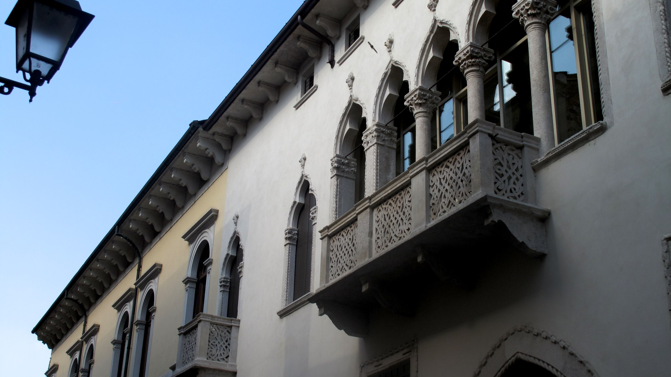 Palazzo Trissino Sperotti (Vicenza)